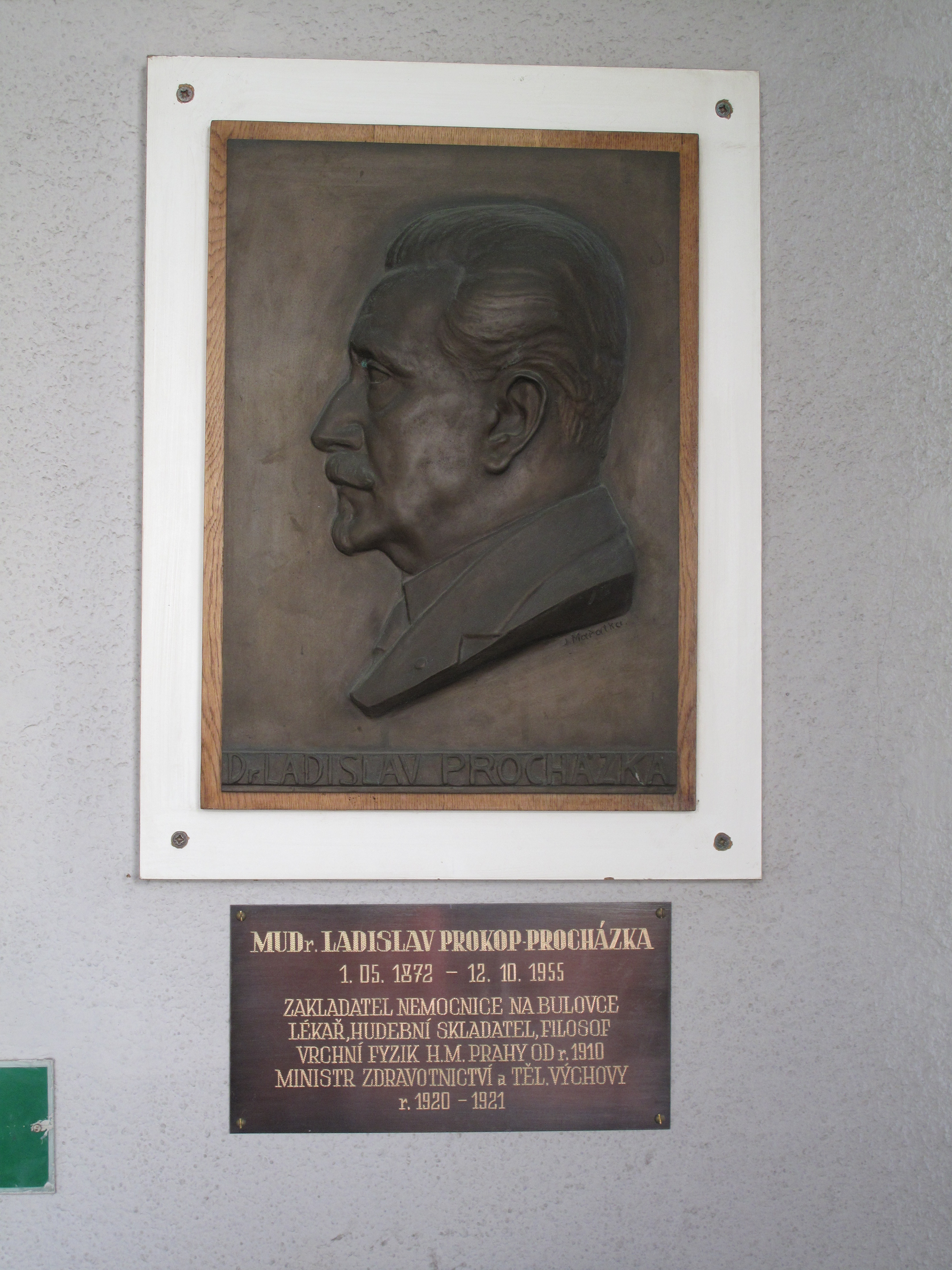 Bulovka, pamětní deska